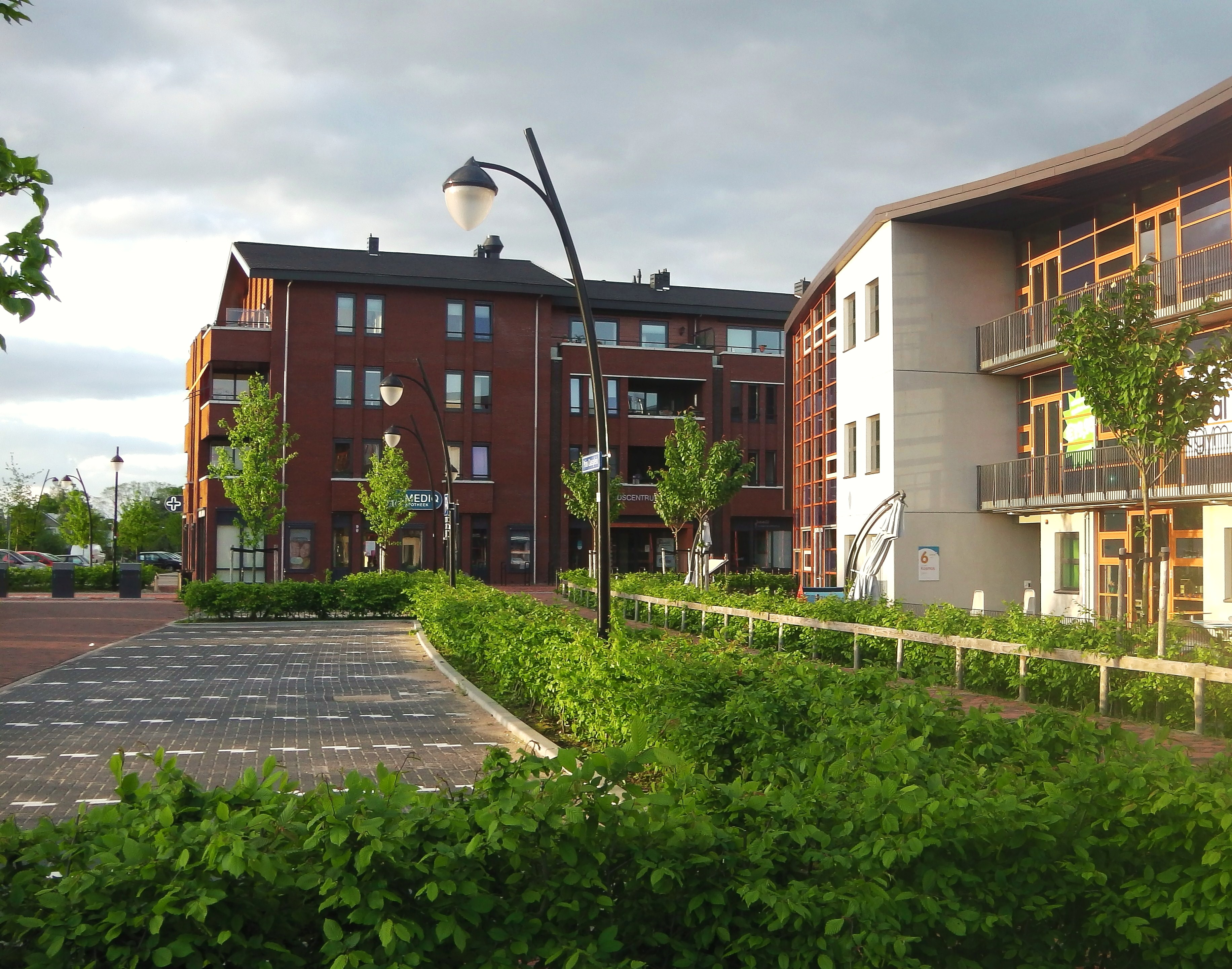 Plein in de nieuwbouwwijk "Tabaksteeg" in het zuiden van de stad. Het plein is vlak naast het winkelcentrum Zuidhoek gelegen.